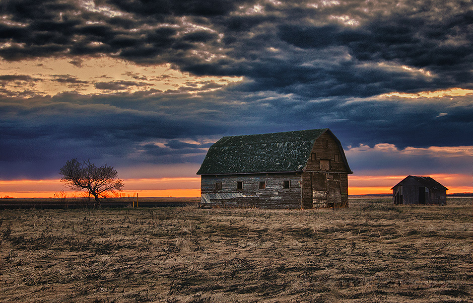 Old barn